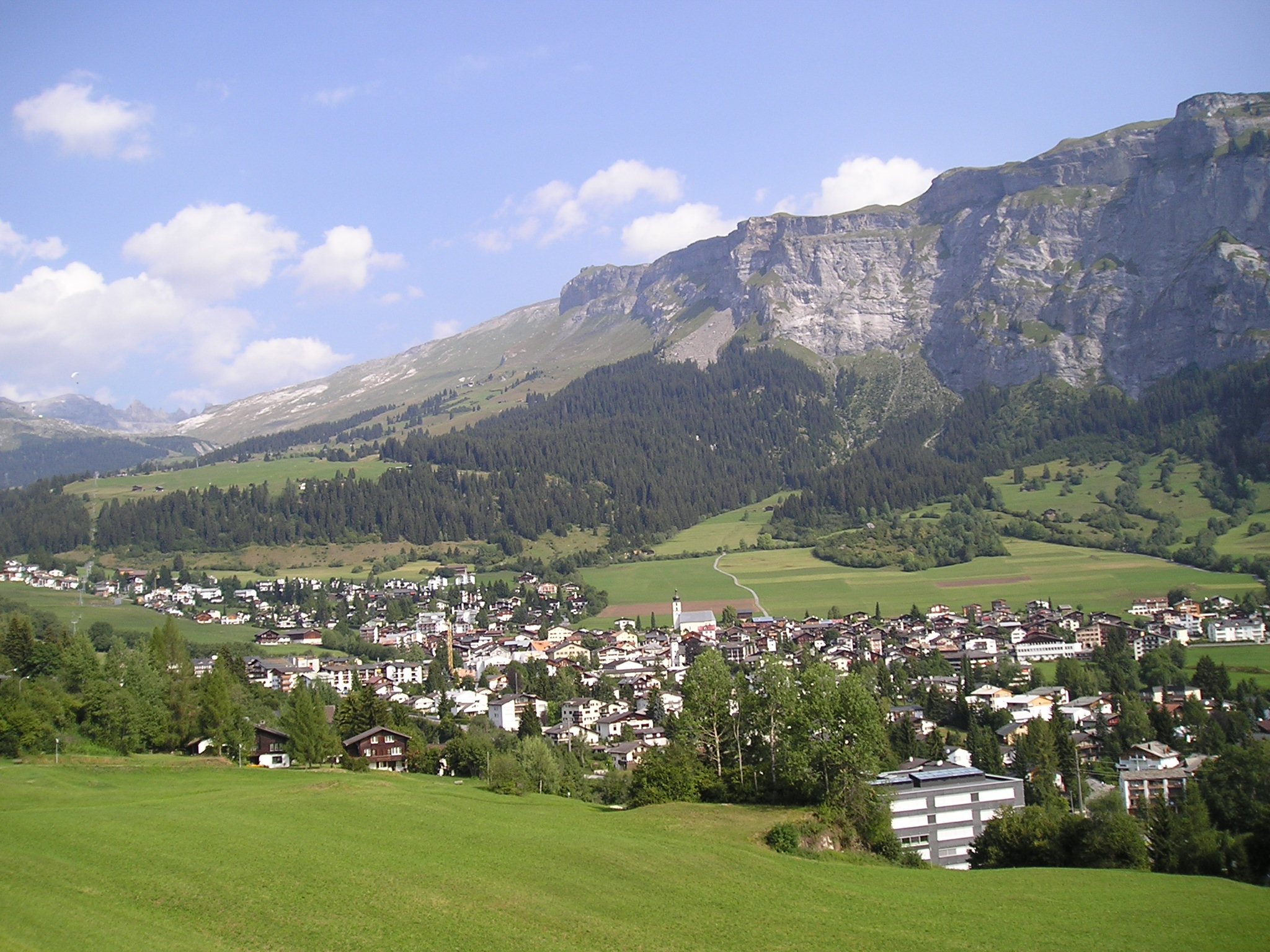 Panorama sul villaggio di Flims ripreso dalla frazione di Waldhaus, autore Massimo Macconi